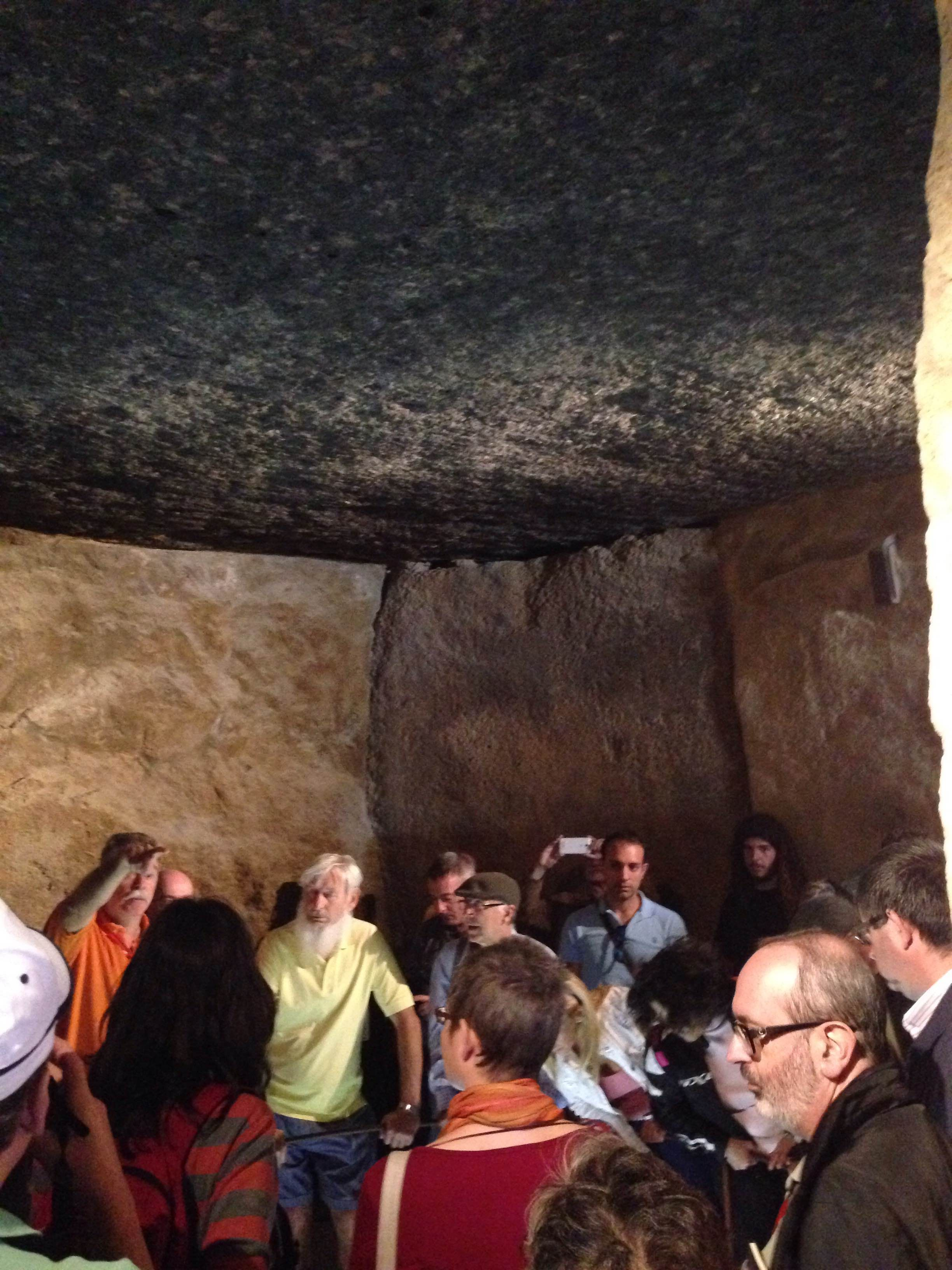 Esperantistoj en la Dolmeno de Menga